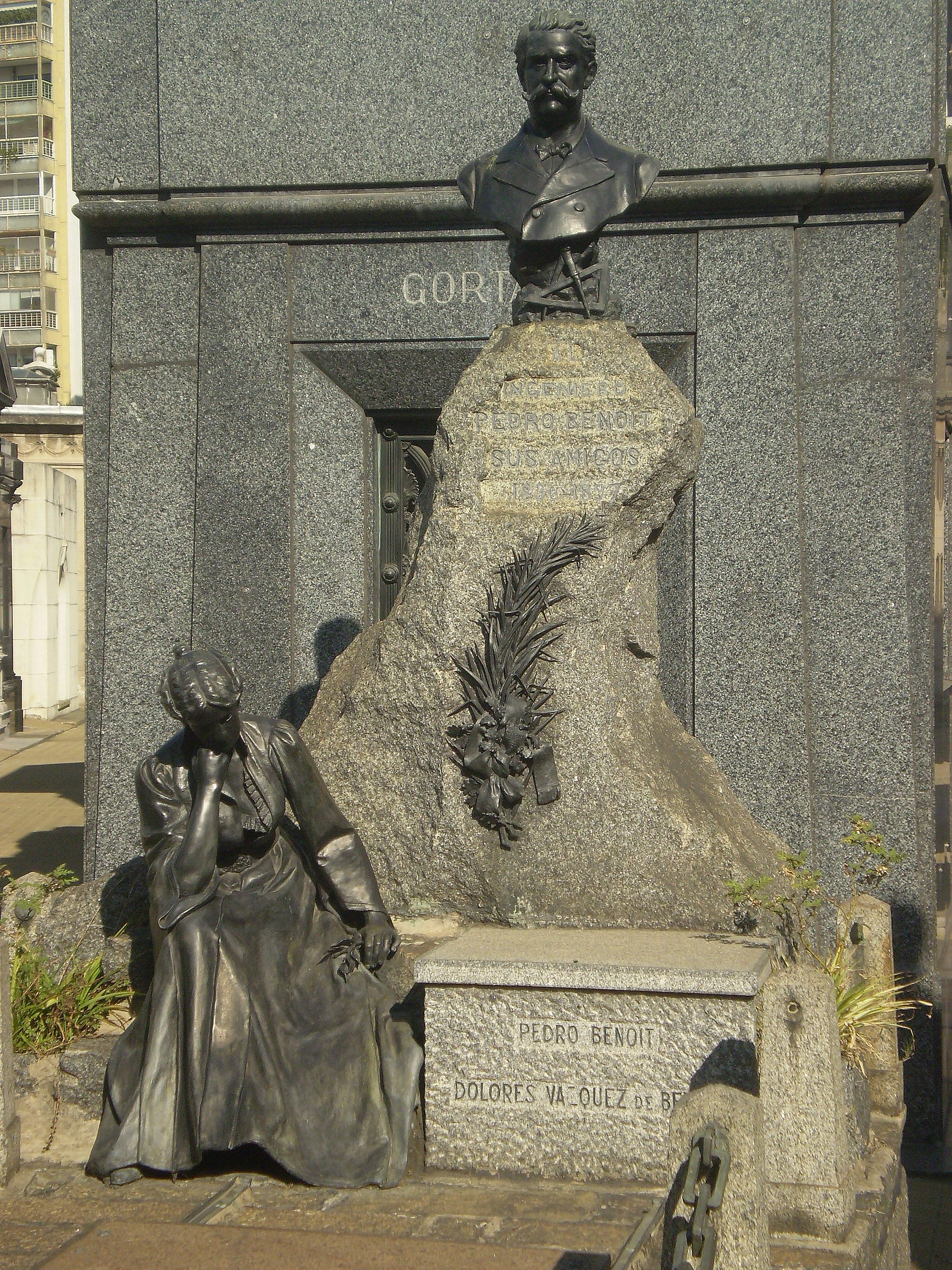 Tumba del Ingeniero Pedro Benoit y de su esposa Dolores Vazquez de Benoit. Cementerio de la Recoleta. Buenos Aires